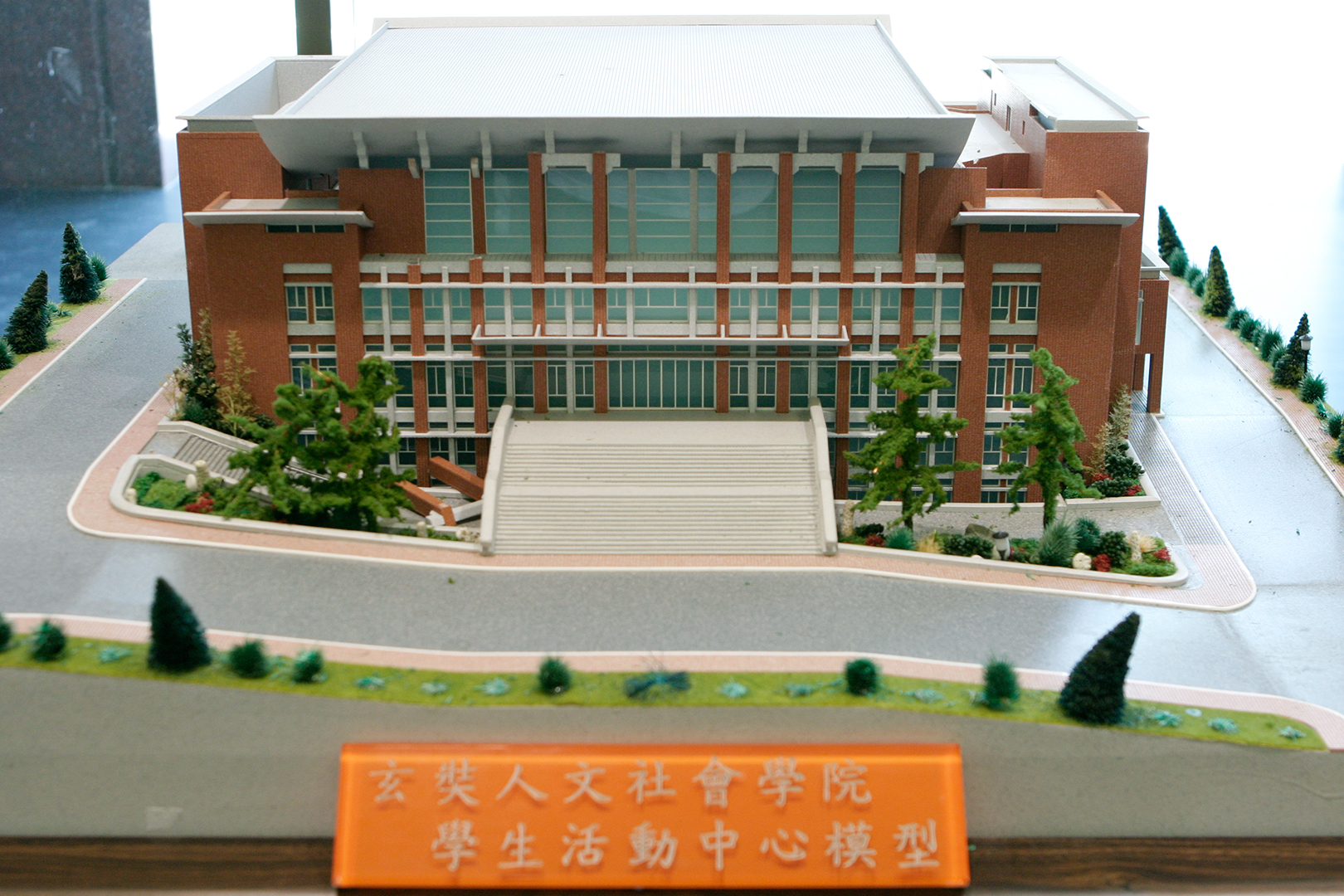 玄奘人文社會學院學生活動中心模型。